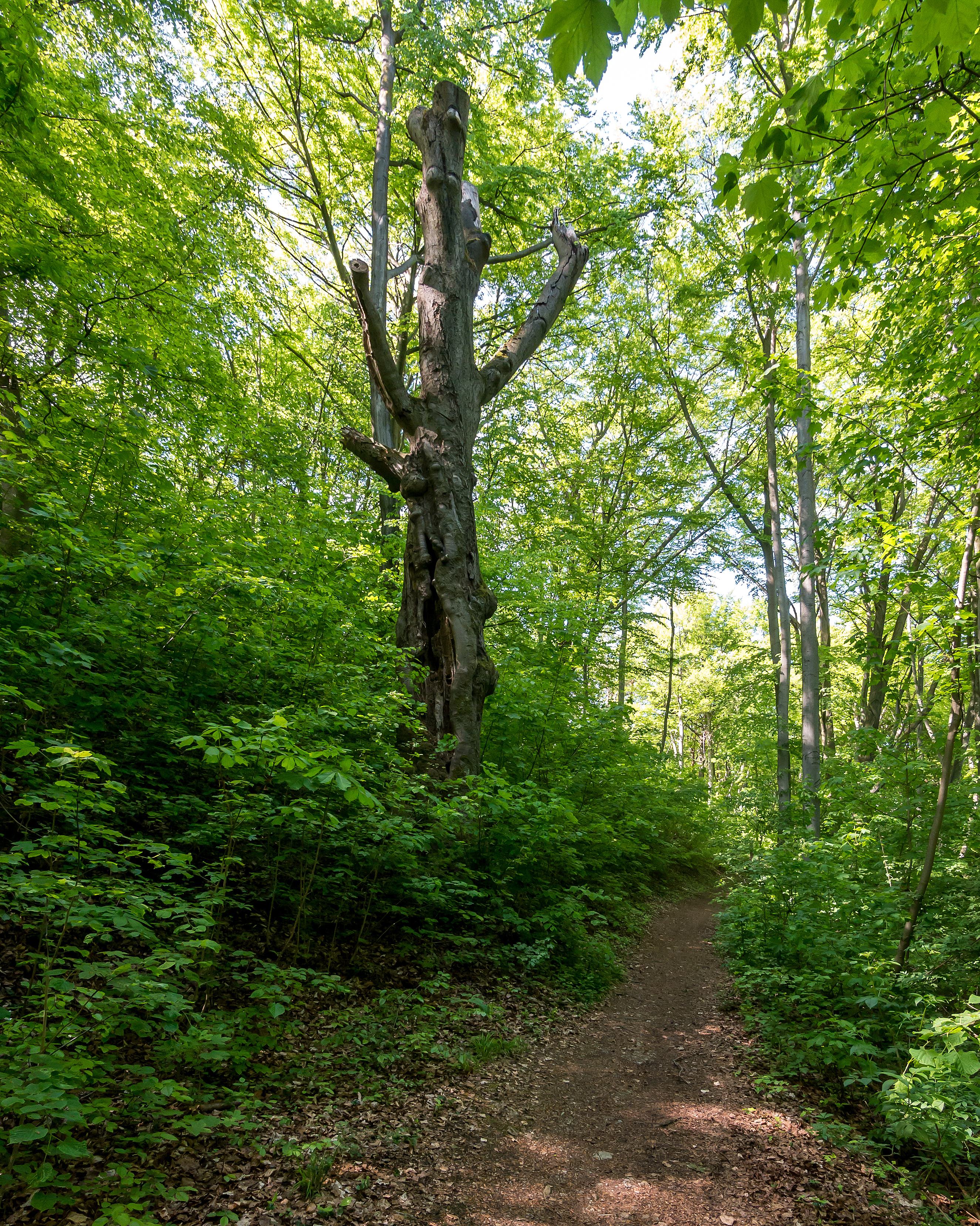 Dicke-Buchen Doc.-Nr. 1963-12 DE-TH Jena II